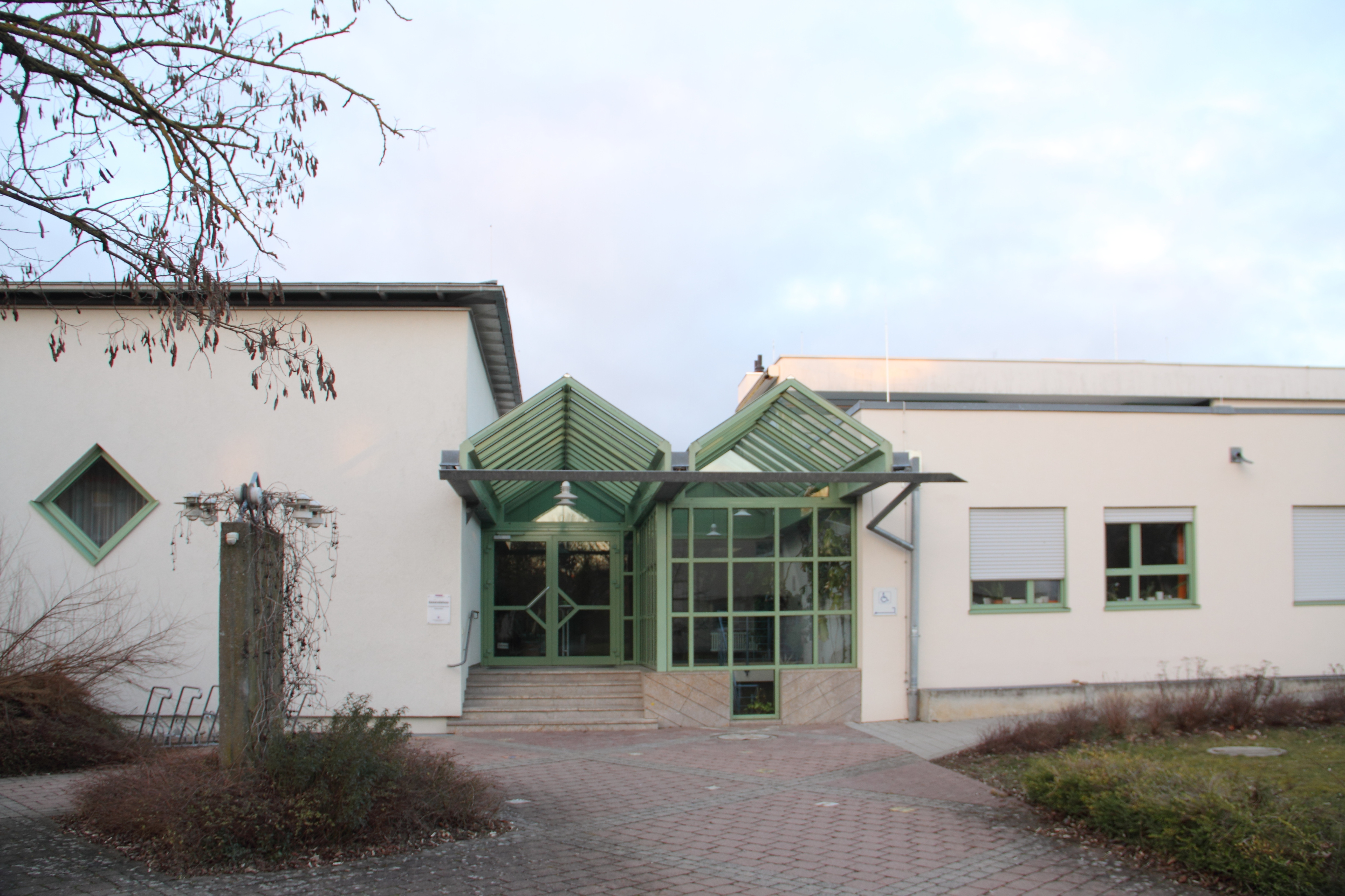 Das evangelische Dekanatsamt in Weikersheim ist der Verwaltungssitz des Kirchenbezirks Weikersheim.